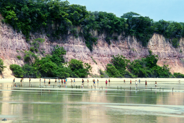 Praia de Pipa em Tibau do Sul, a 85 km de Natal, Rio Grande do Norte, Brasil. Pipa Beach in Tibau do Sul, the 85 km of Natal, Rio Grande do Norte, Brazil.